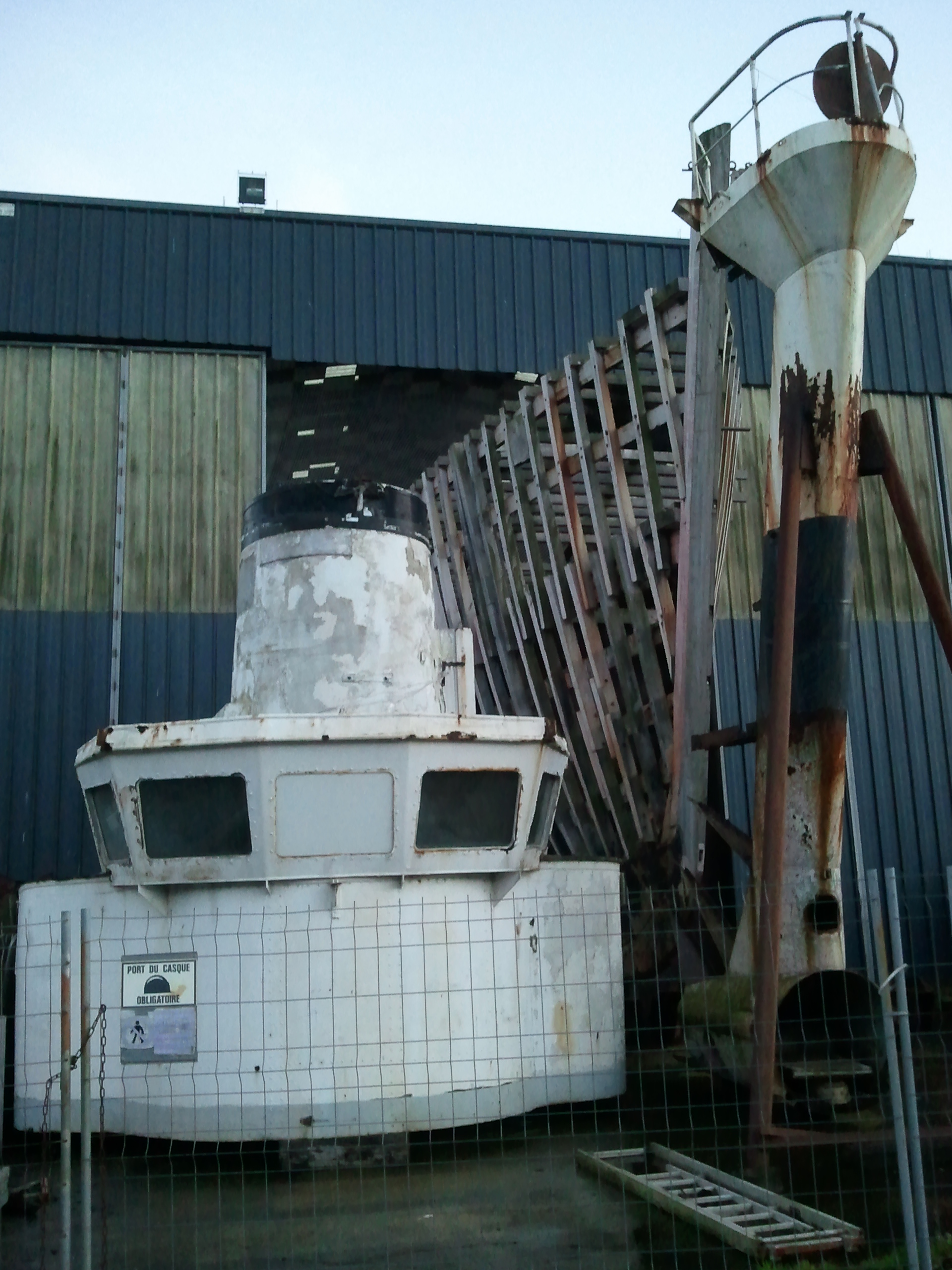 Calypso sous hangar, à Concarneau